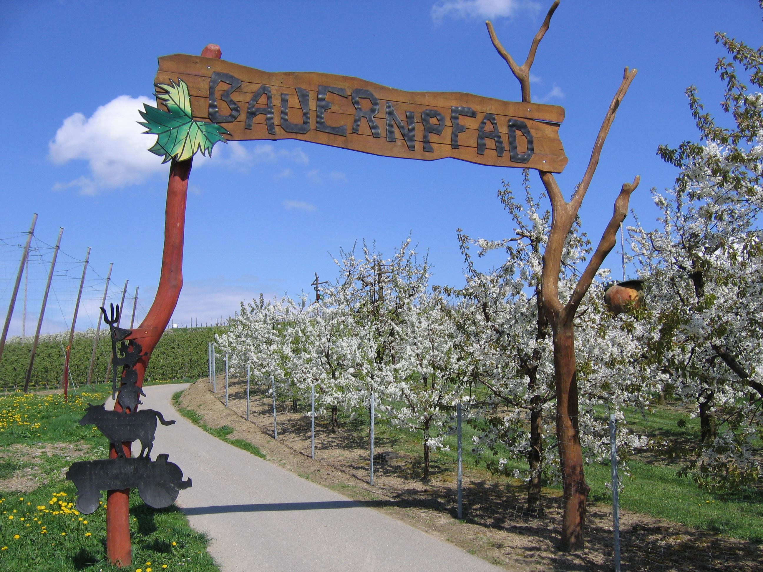 D-Kressbronn am Bodensee, Eingang zum Bauernpfad